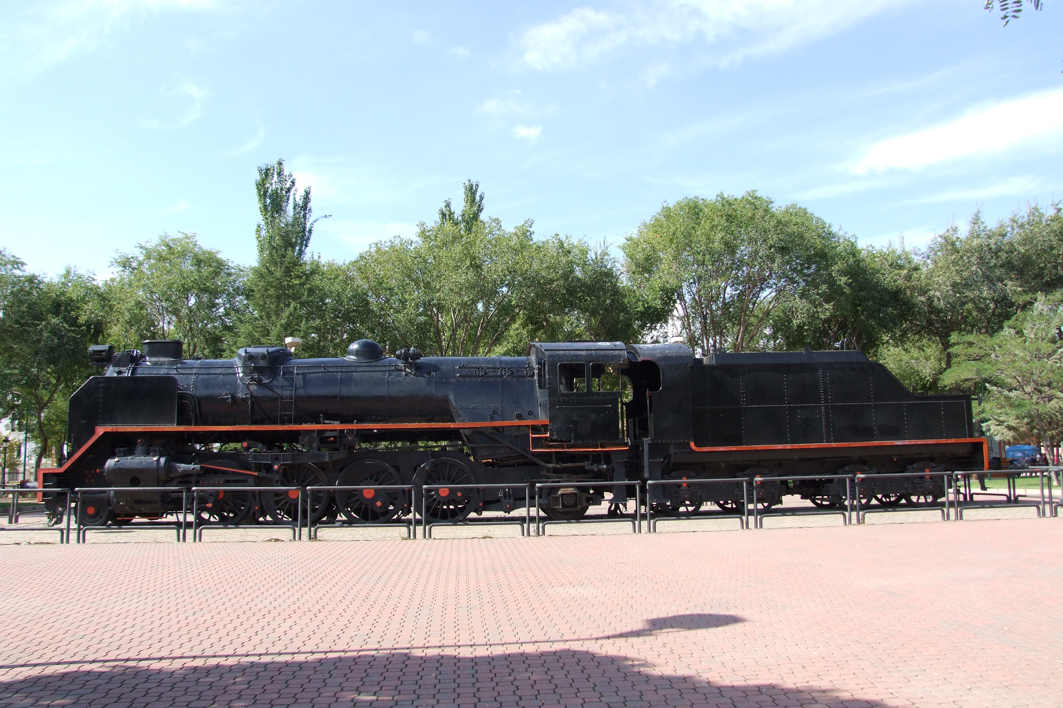 Máquina del ferrocarril a vapor en el parque lineal de Albacete